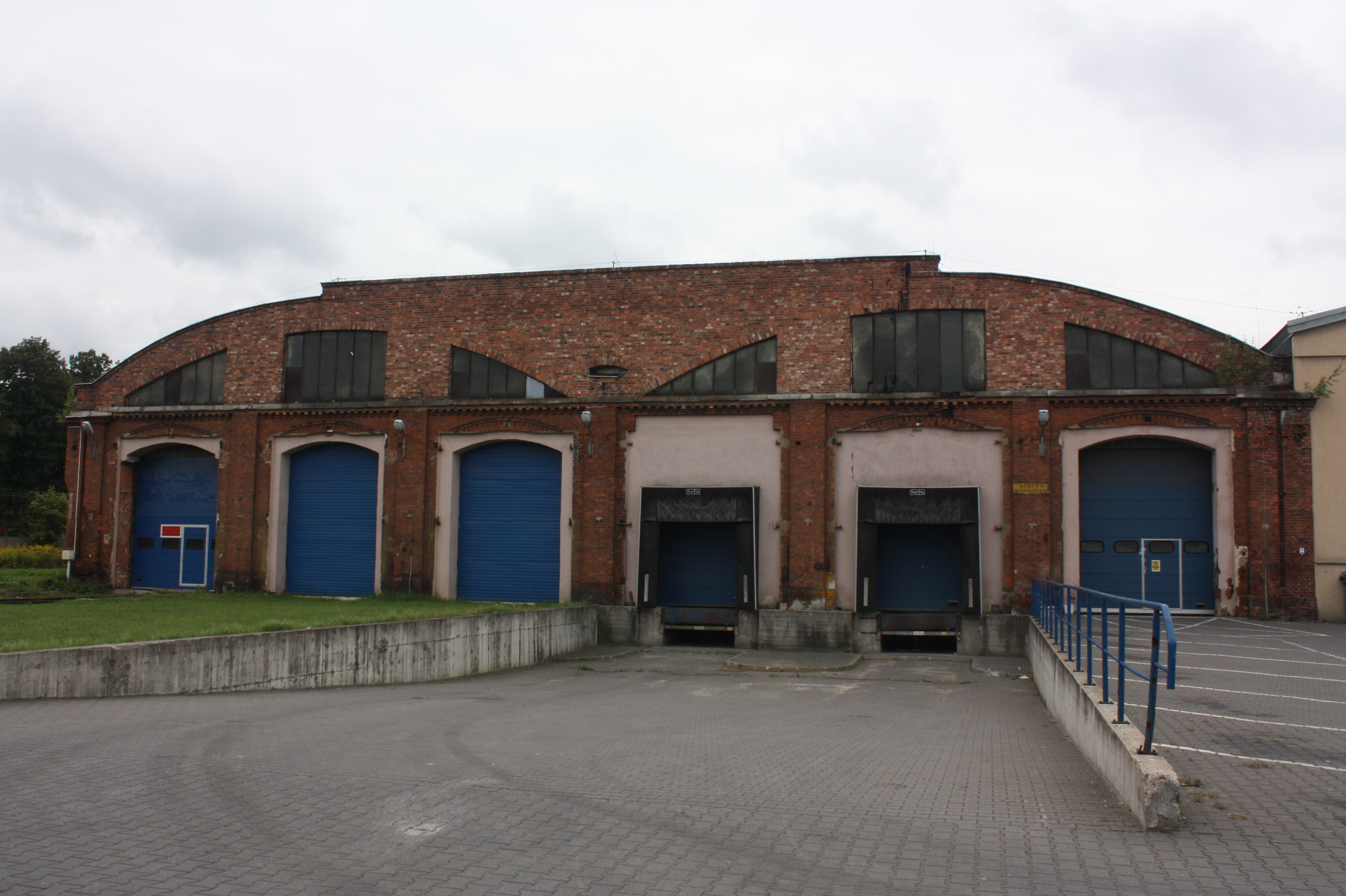 Pruszków, hala napraw wagonów towarowych, 1927